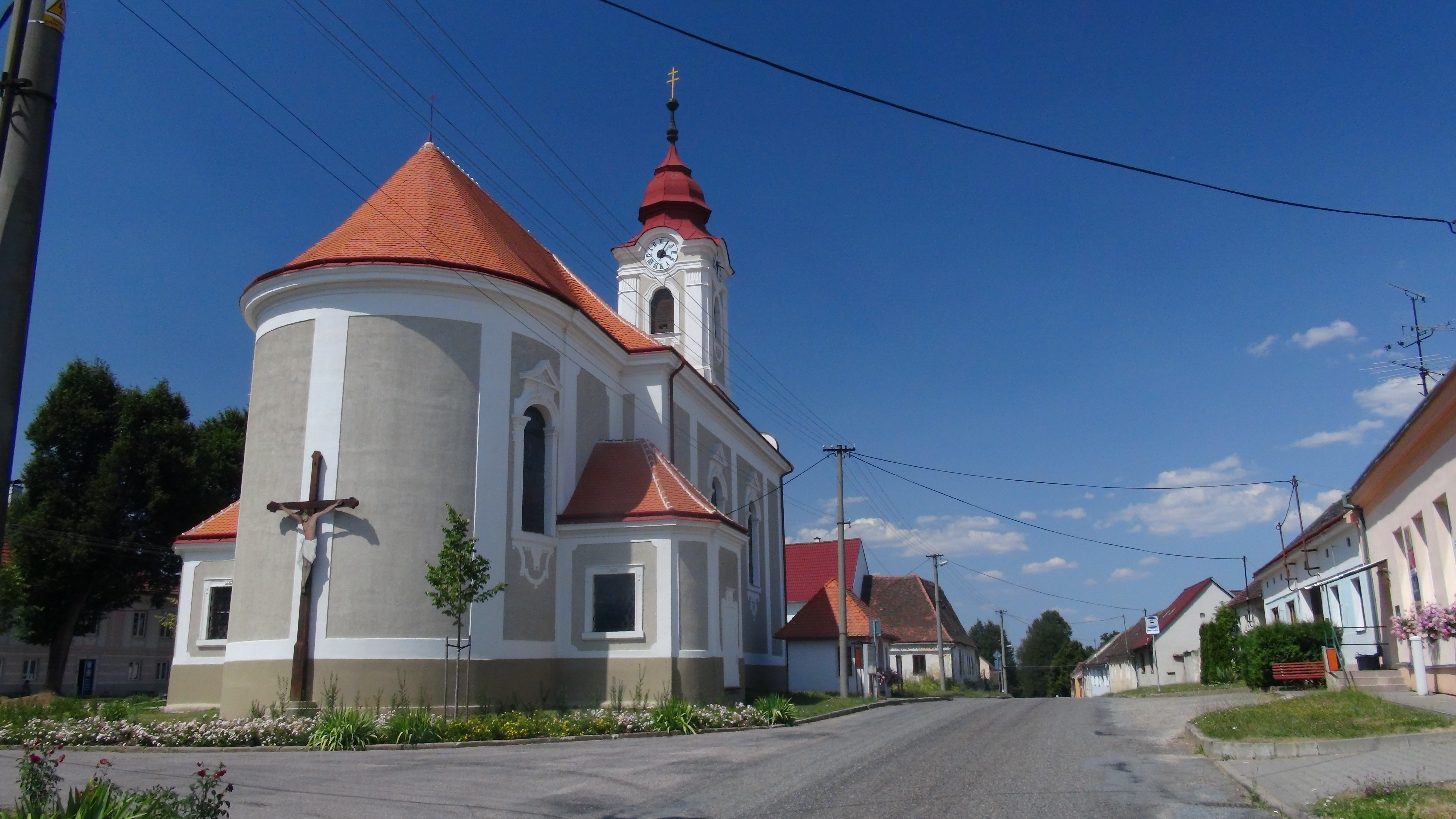 Kostel sv. Bartoloměje (Šafov), Šafov